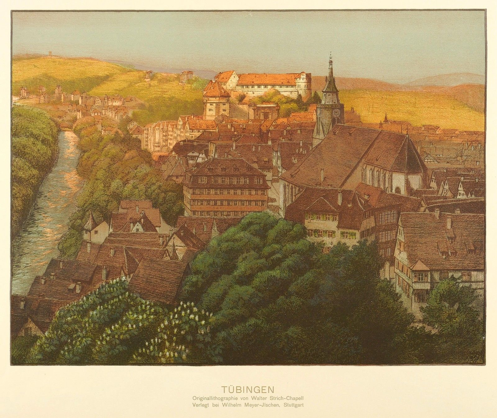 Tübingen vom Österberg (Farblithographie, Größe 40,2 x 53,6 cm (Bild); 56 x 70 cm (Blatt))